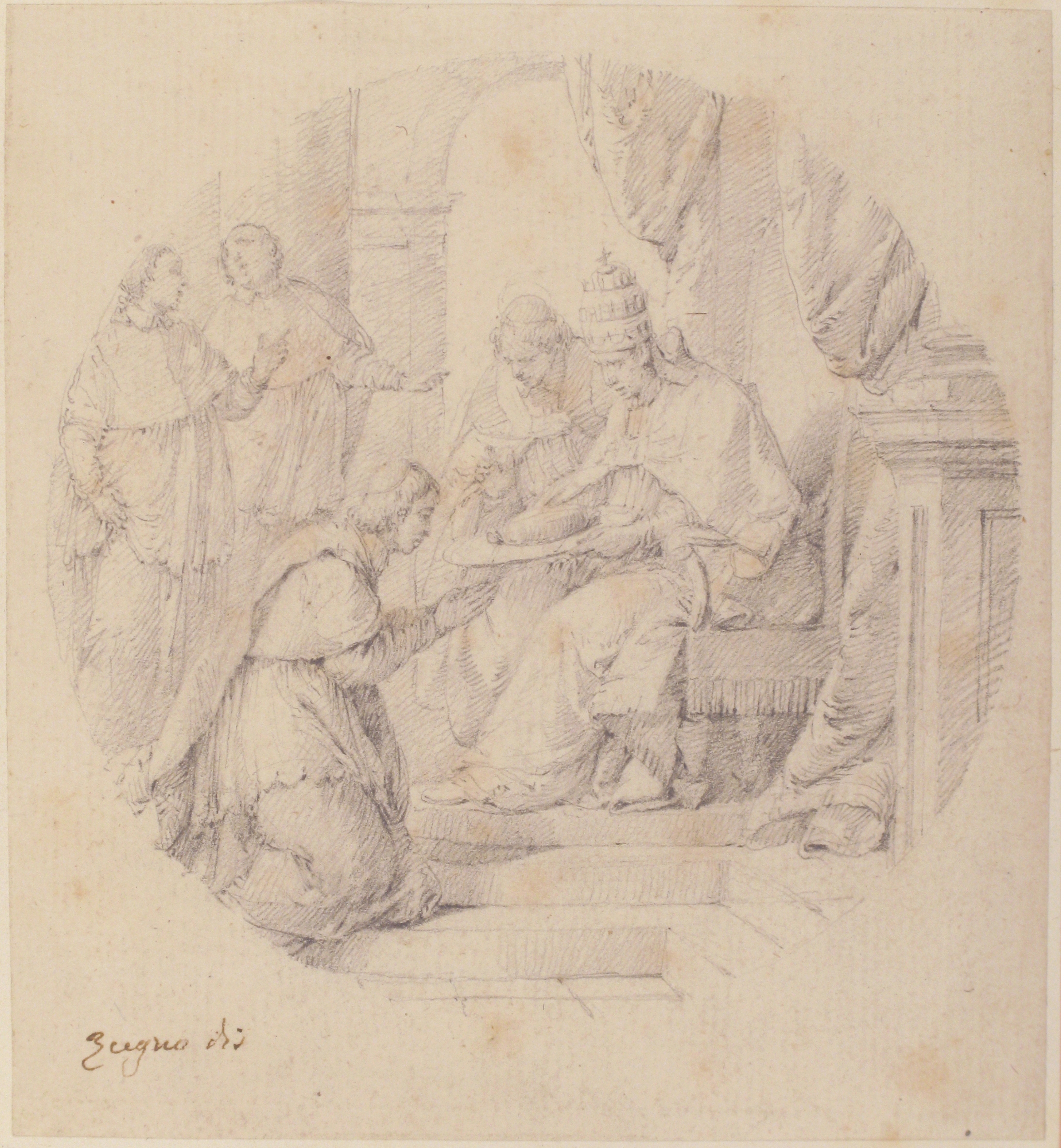 Drawing; Drawings